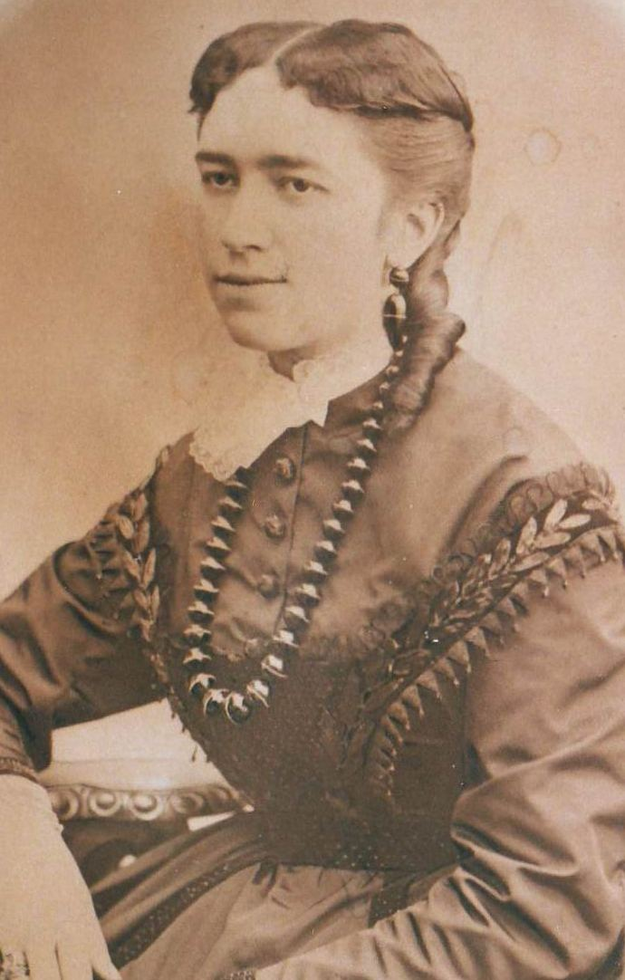 Fotographie von Elvine de La Tour